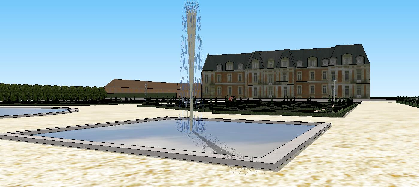 Vue du château depuis le petit bassin carré du milieu du parterre, vers 1690